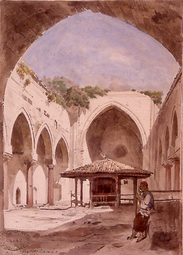 La côte de la Mer Noire. La cour du Medrese (école) de Süleyman Pervane. Crayon et aquarelle.